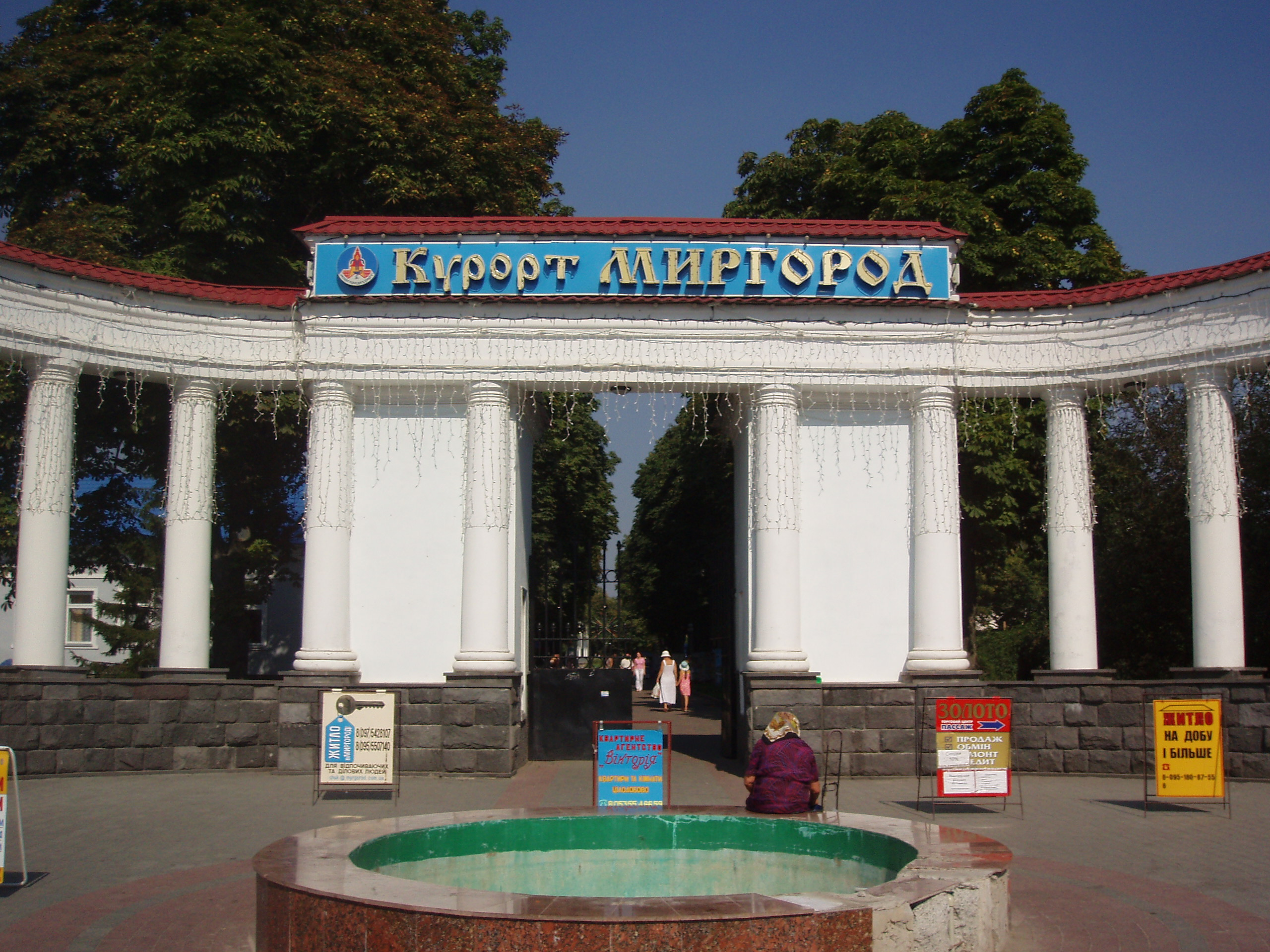 Центральна брама до курортного комплексу в Миргороді Полтавської області